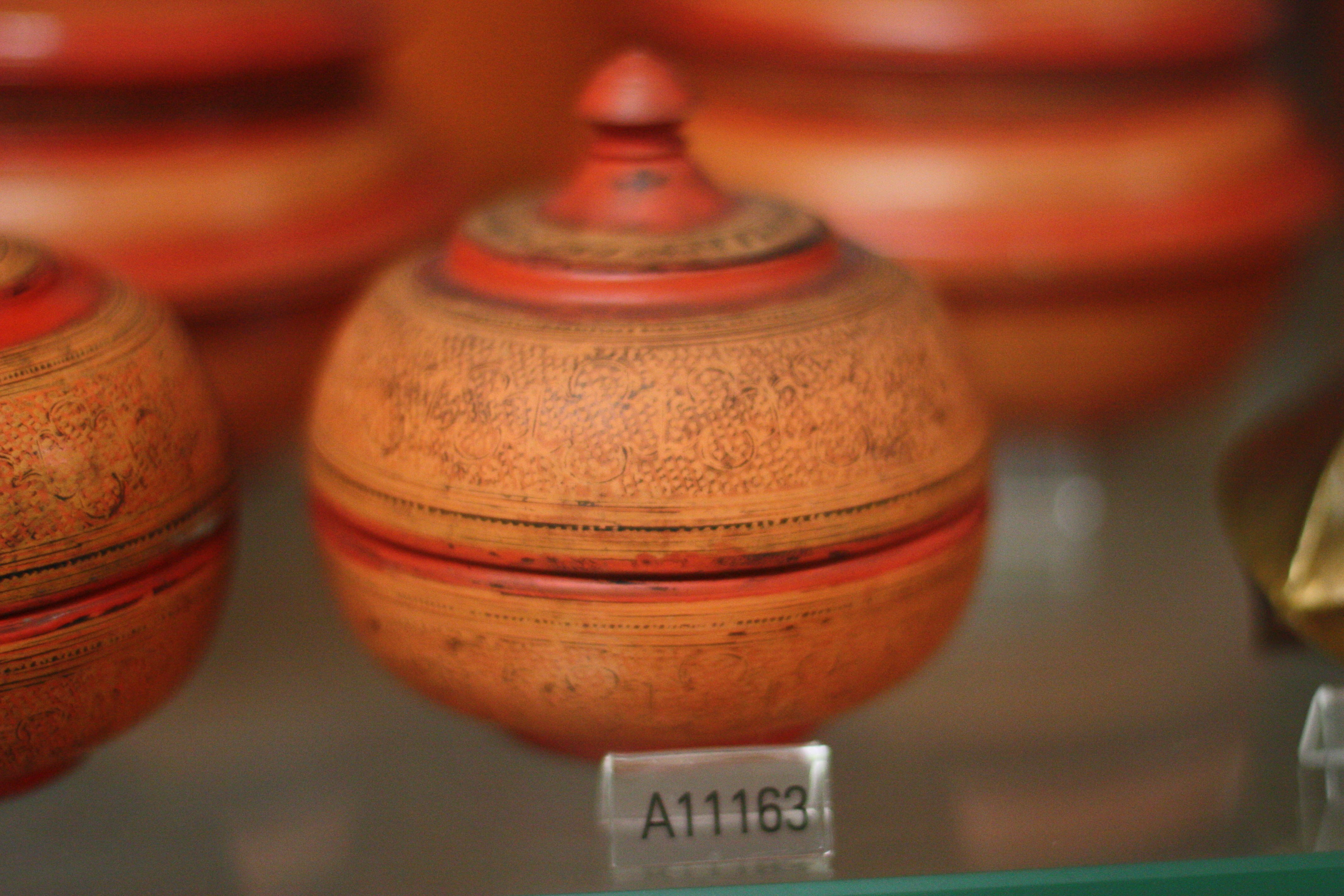 Lackkunst im Überseemuseum Bremen